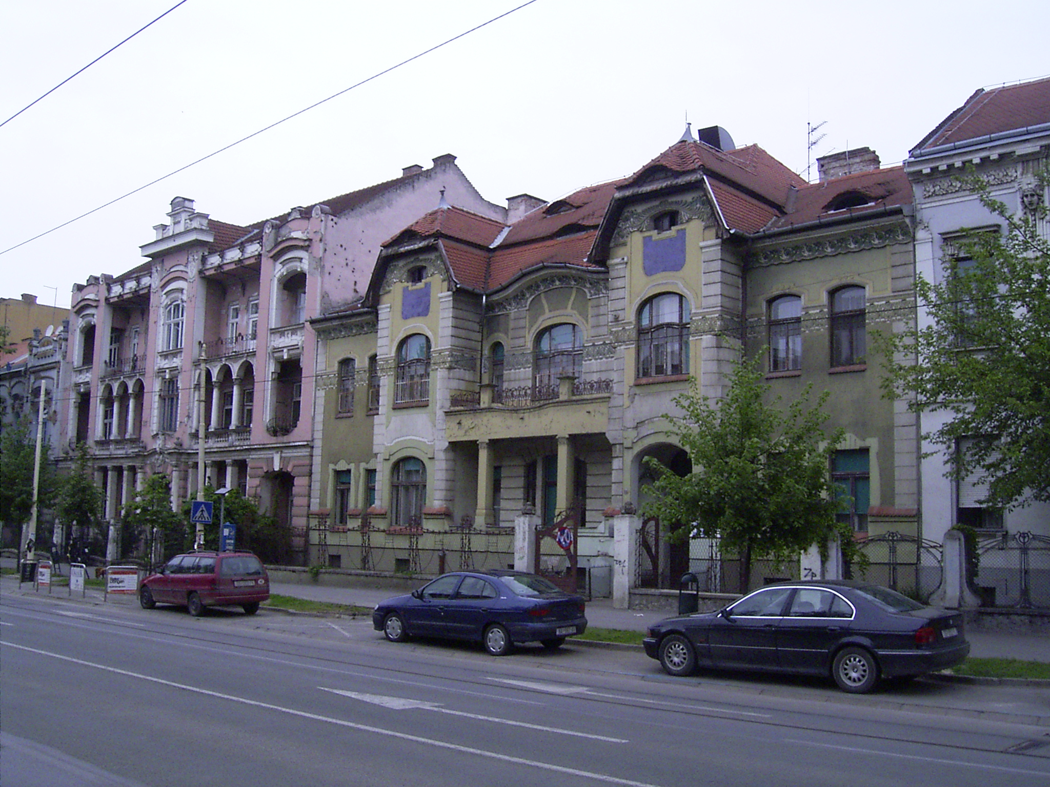 Building in european avenue (Europska Avenija), Osijek, Croatia